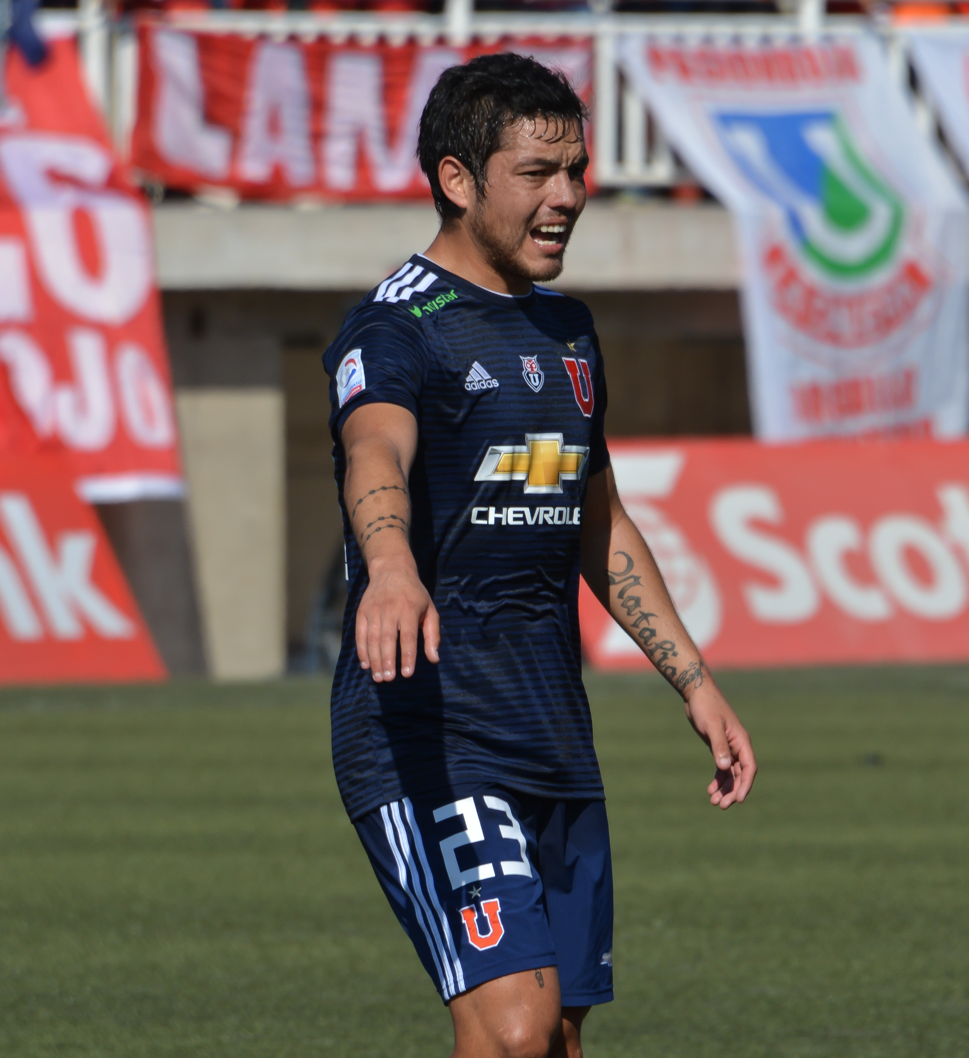 Unión La Calera v Universidad de Chile, Estadio Municipal Lucio Fariña Fernández, Quillota, Chile.